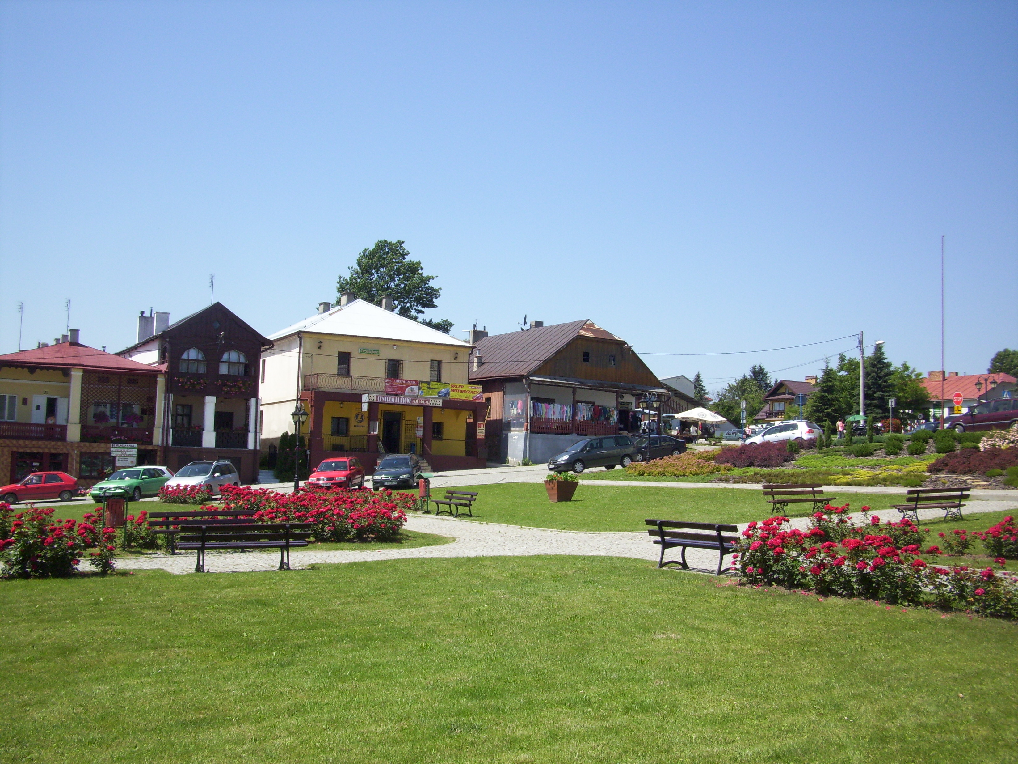 Scorcio della piazza principale di Pruchnik